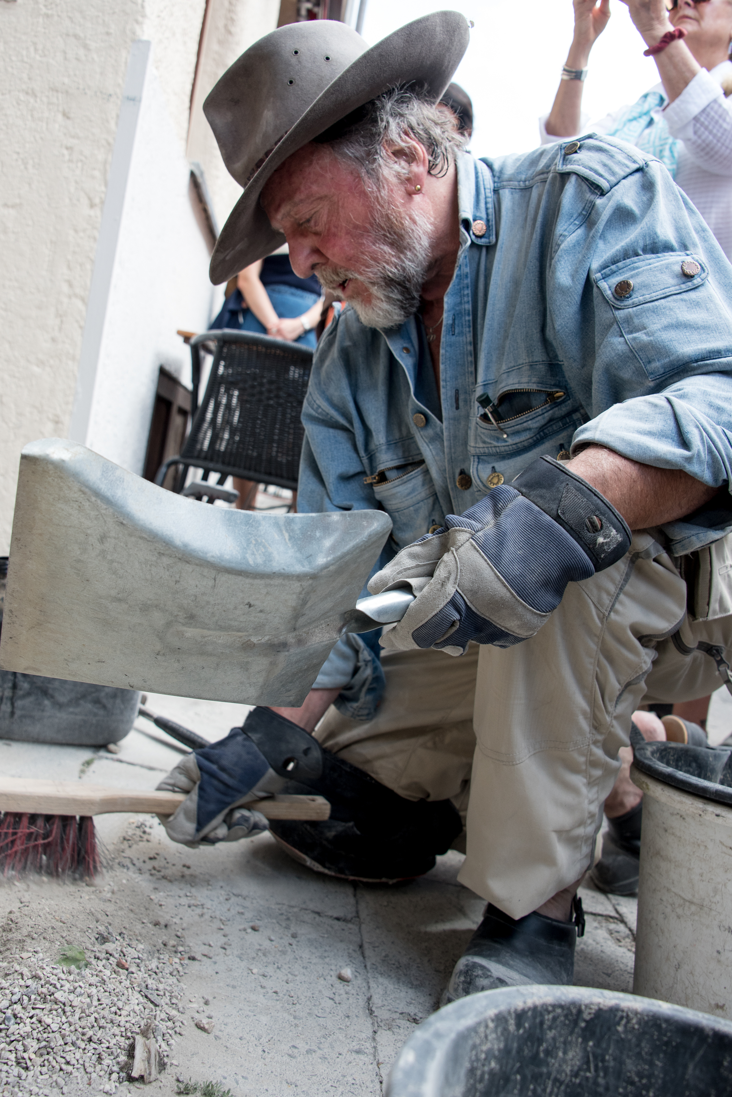 Gunter Demnig bei der Stolpersteinverlegung in München am 27. Juni 2017